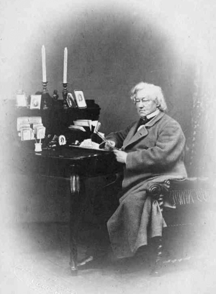 Carl Lampe (1804–1889), Fotografie von Bertha Wehnert-Beckmann